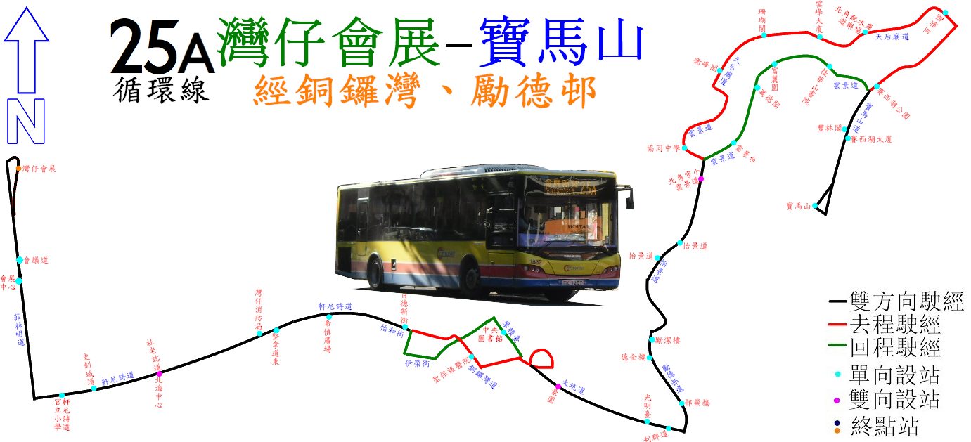 中文（香港）: 城巴25A線的走線圖